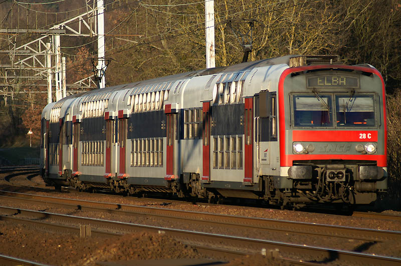 La Z 5656 près de Lardy (91).